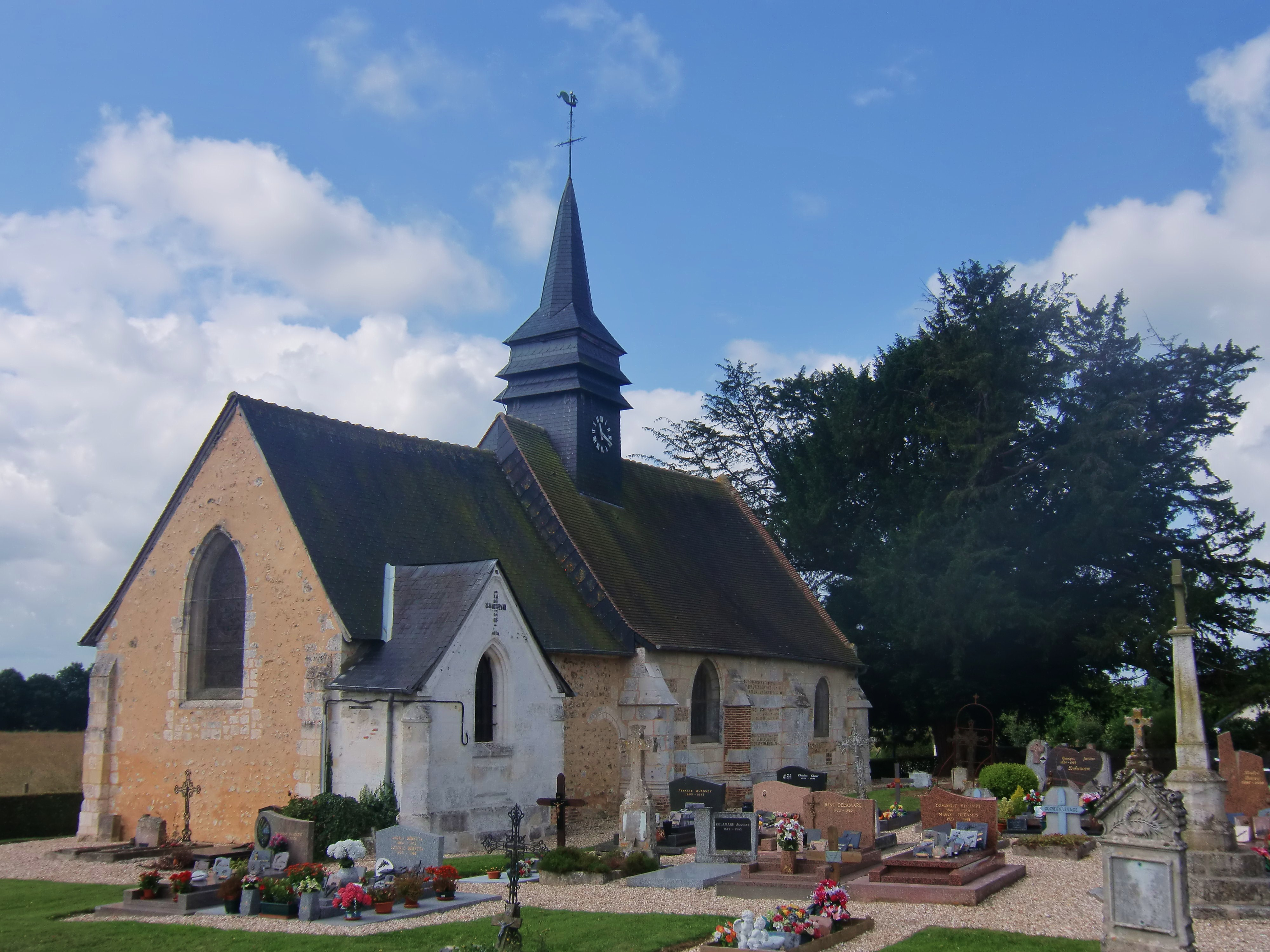 Eglise de Tocqueville (Eure, Normandie, France)